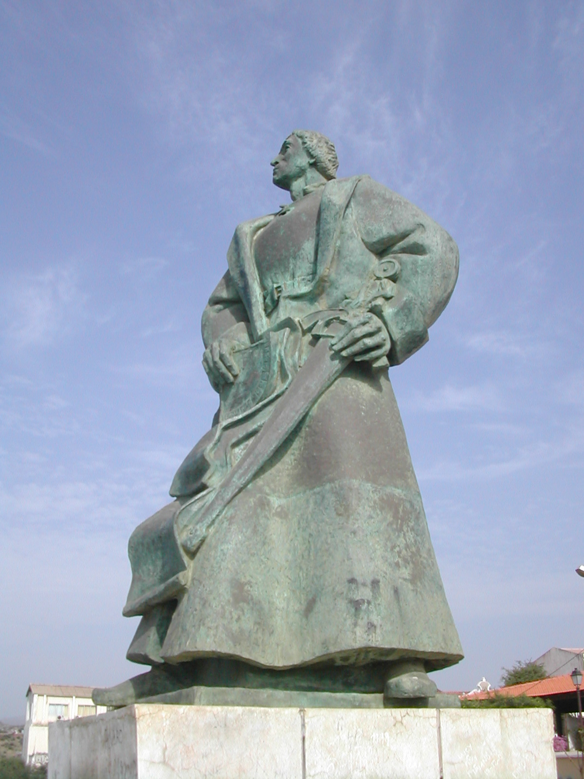 Estátua de Diogo Gomes, Praia, Cabo Verde